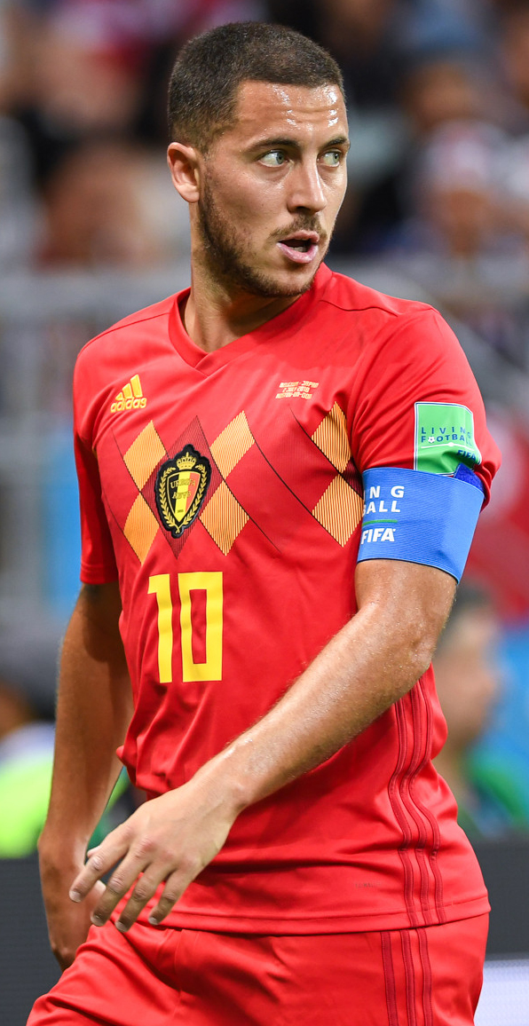 Потрясающий камбэк сборной Бельгии в матче с Японией